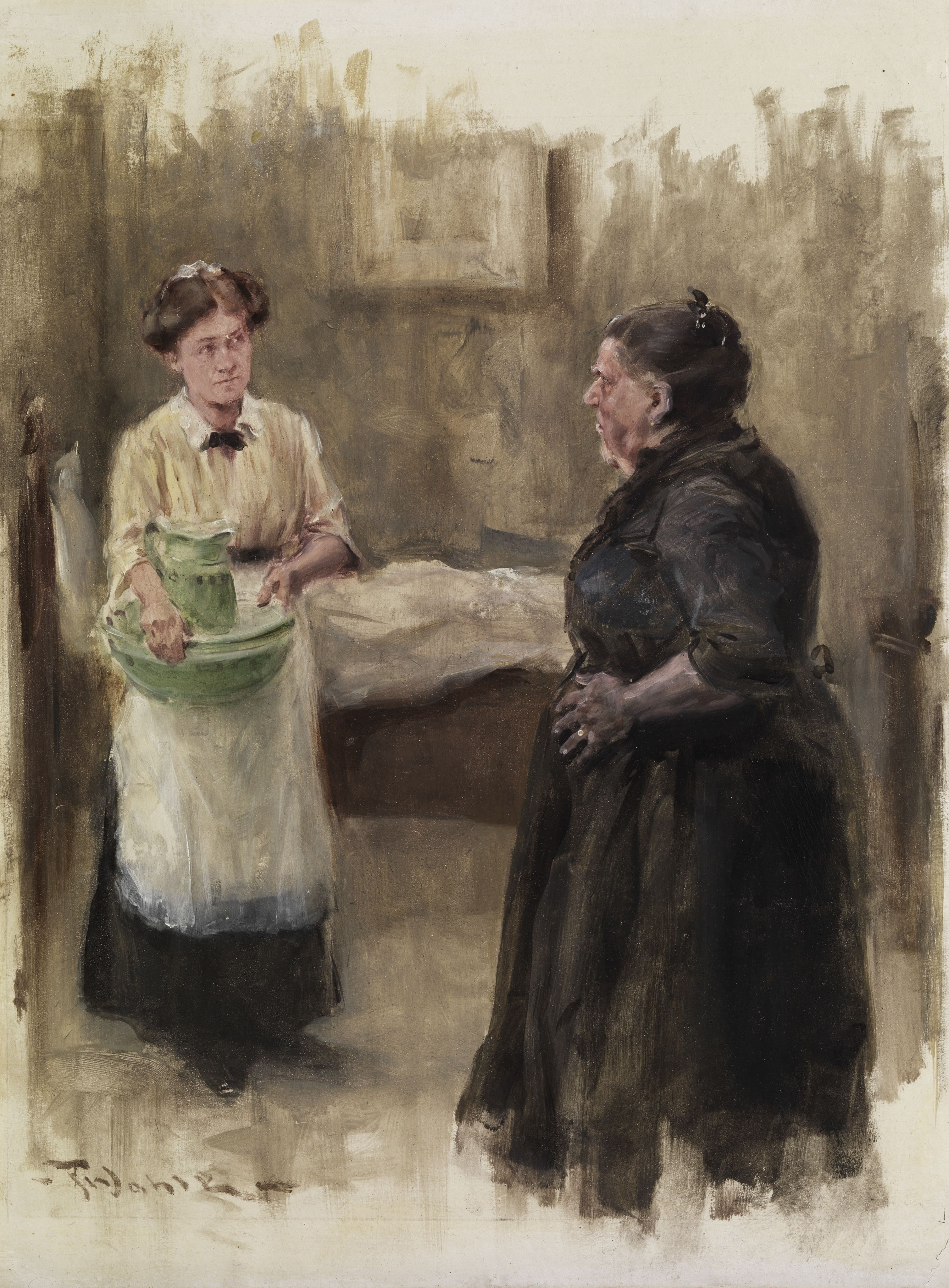 Das Dienstpersonal. Öl auf Holzplatte. 39,8 x 30 cm.